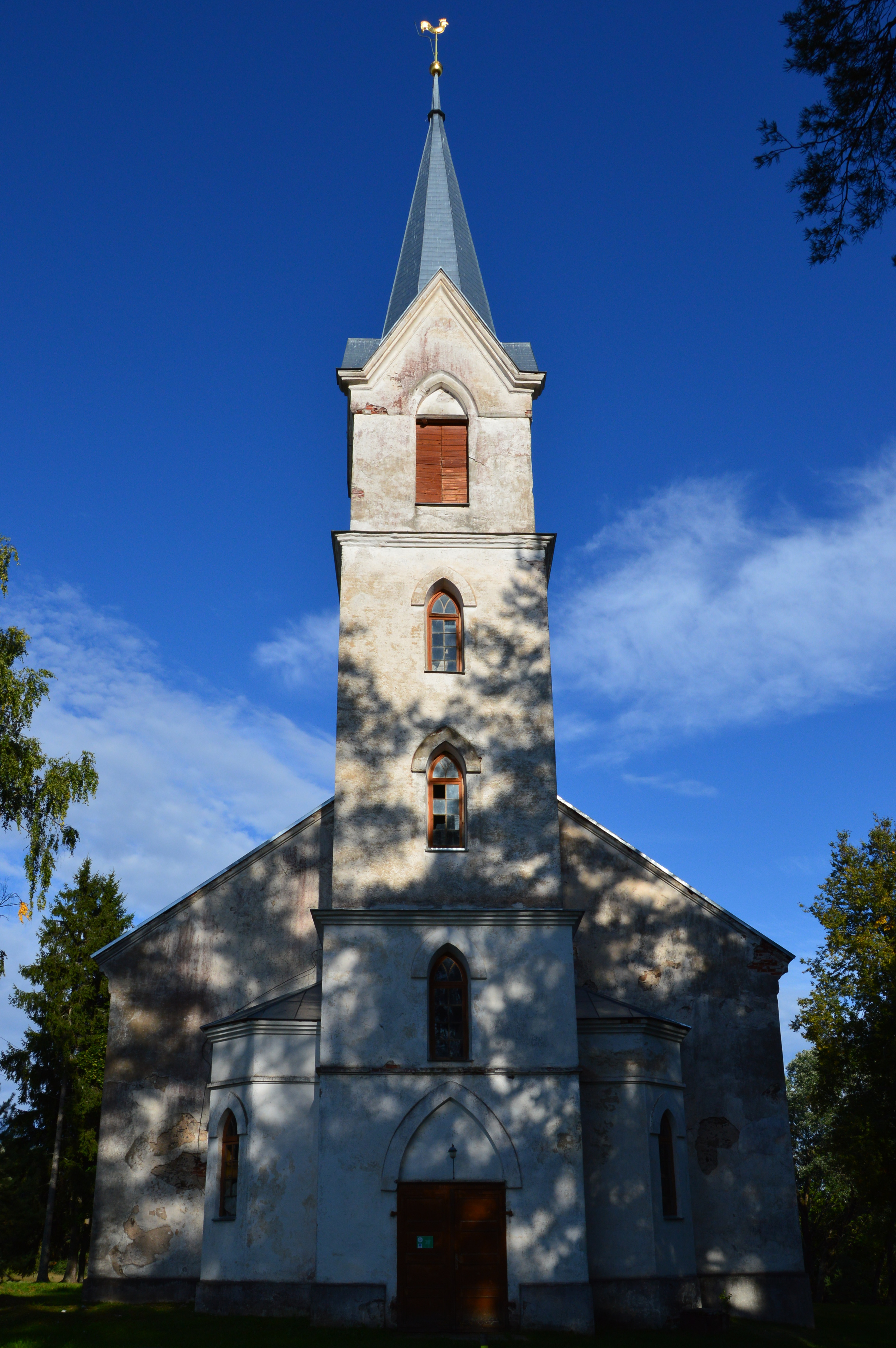 Hargla kirik